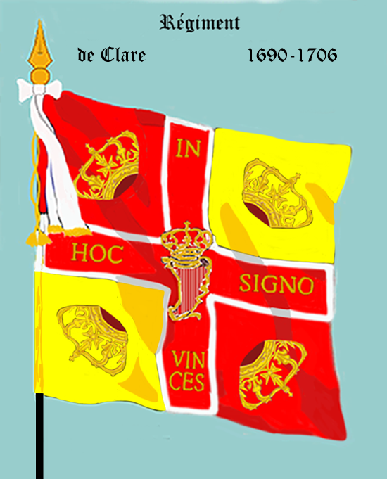 Ordonnanzfahne eines Fremdenregiments im königlich französischen Dienst. - Entnommen und überarbeitet aus: „LES UNIFORMES ET LES DRAPEAUX DE L'ARMÉE DU ROI“ Marseille 1899. (Drapeau d'Ordonnance d' un régiment etranger au service française.)